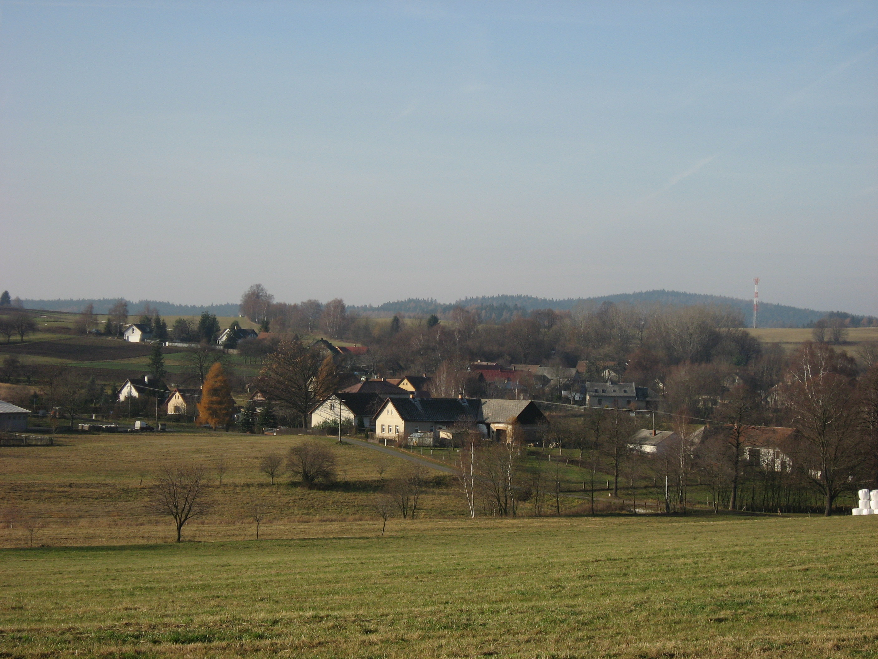 Boňkov, vesnice v kraji Vysočina